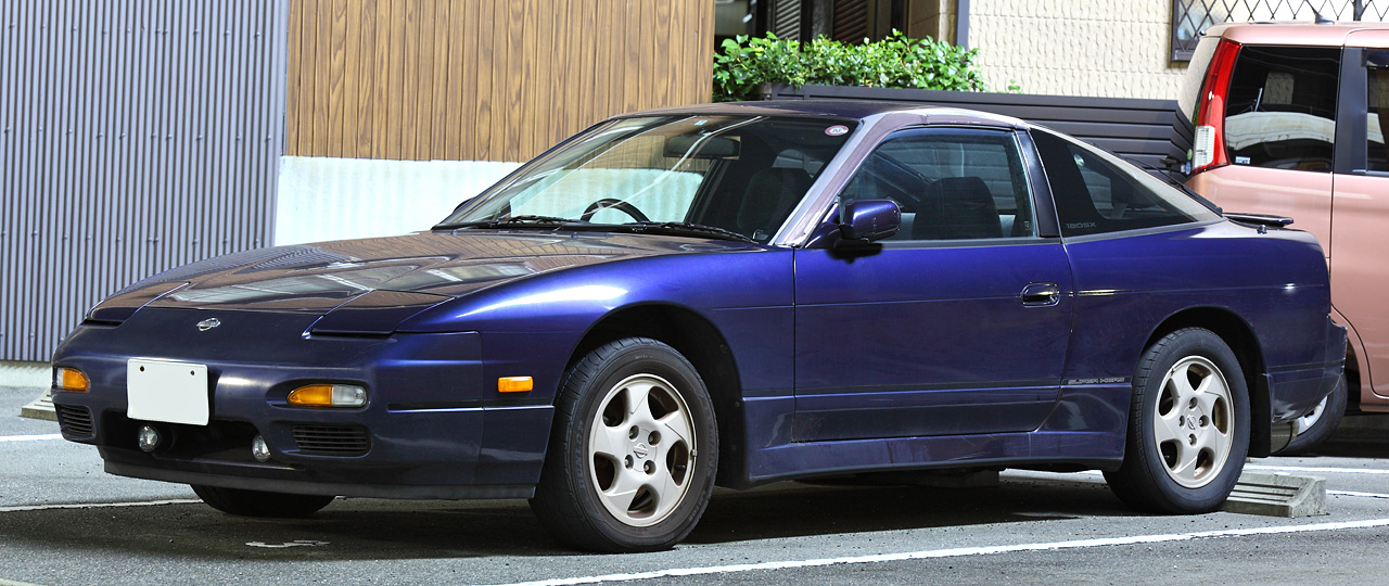 Nissan 180SX (S13)